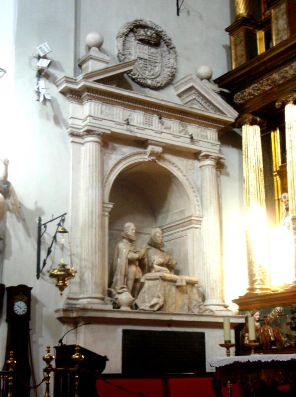 Iglesia de san Miguel, Valladolid, España, sepulcro de los Condes de Fuensaldaña, patronos del templo. Obra de Francisco de Praves, hacia 1620.